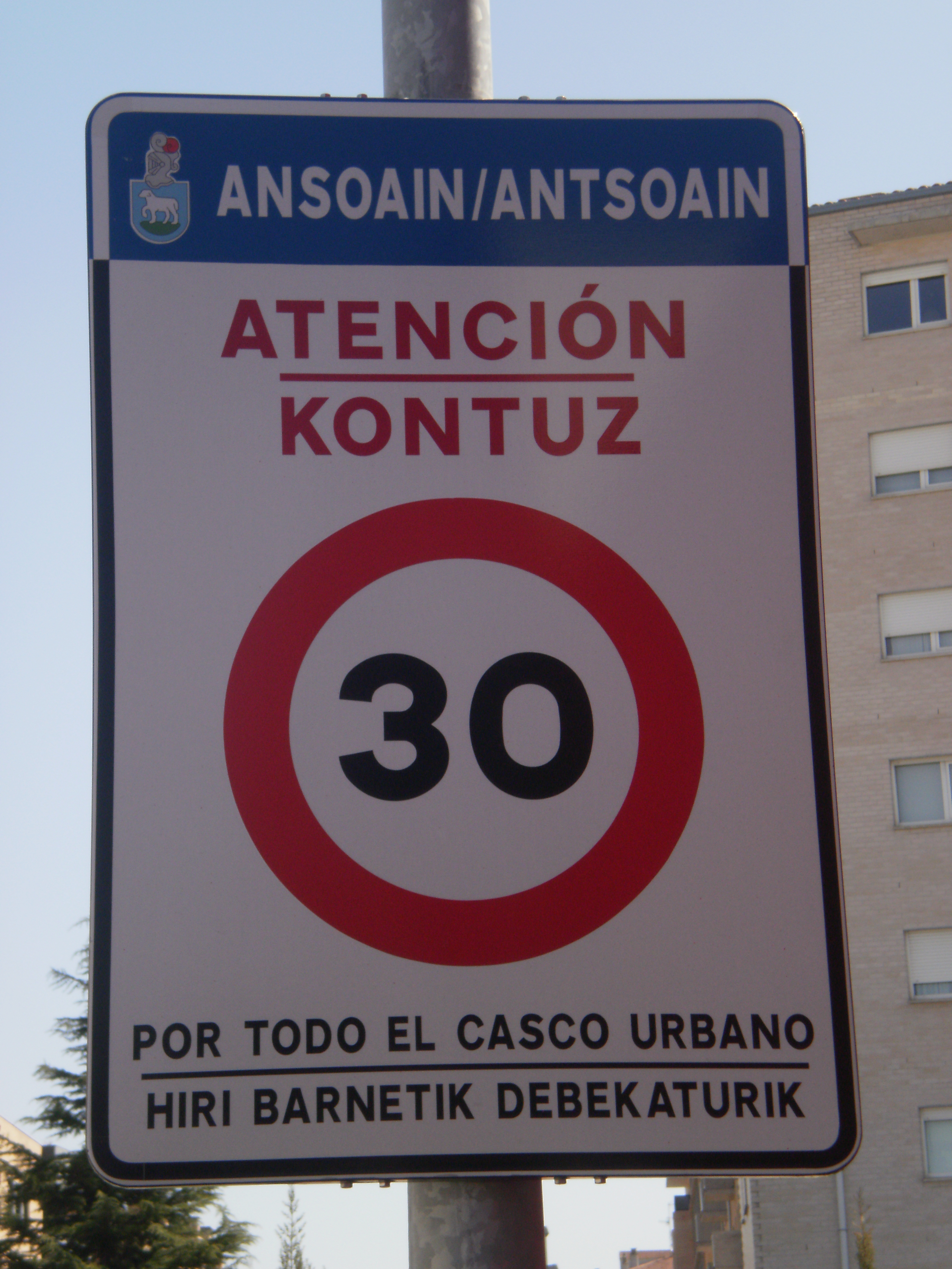 Señal que indica la velocidad másima de 30 km/h en la entrada de la zona residencial de Ansoáin (Navarra-España)